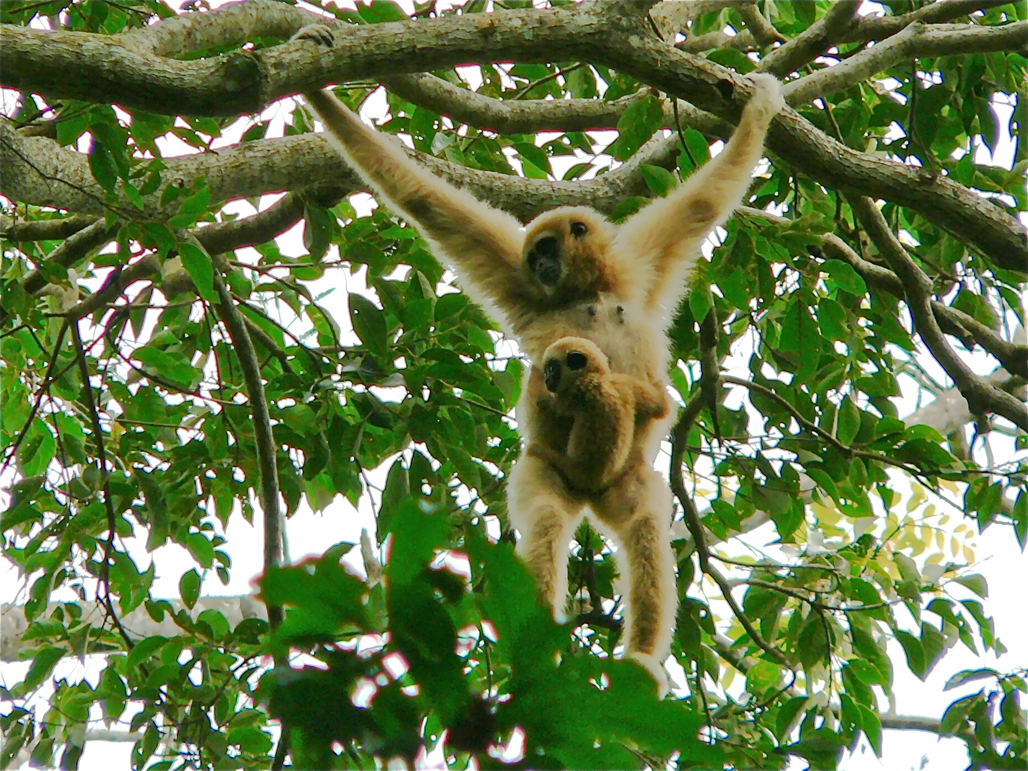 Khao Yai NP, THAILAND